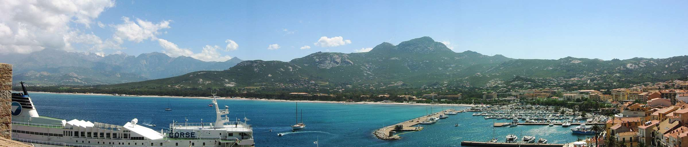 Calvi